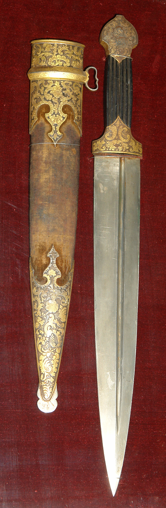 Кинжал из аносовского булата узорчатой стали. Изготовлен в 1840 г. на Златоустовском заводе. Военно-исторический музей артиллерии, инженерных войск и войск связи, Санкт-Петербруг (Dagger of anosovskogo Bulat figured steel. Built in 1840, Zlatoust factory. Military historical Museum of artillery, engineer and Signal Corps, St. Peterbrug).